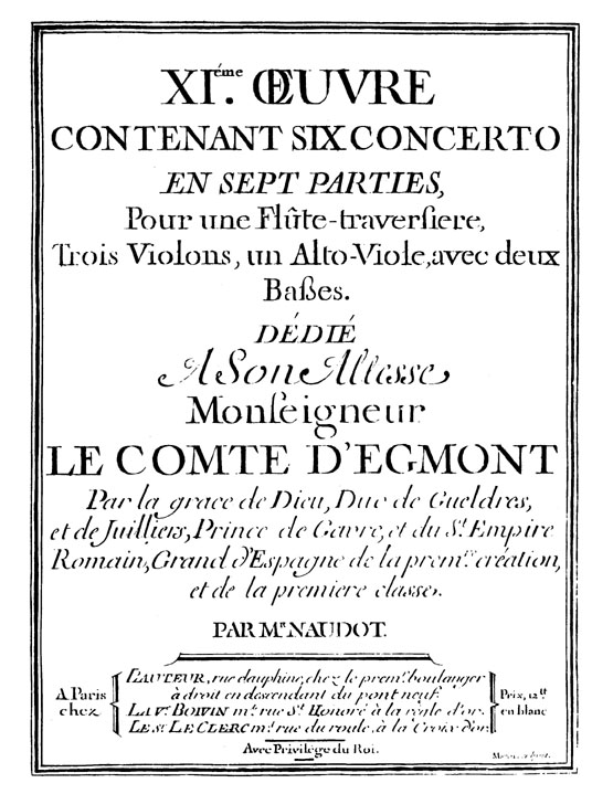 Naudot opus 11